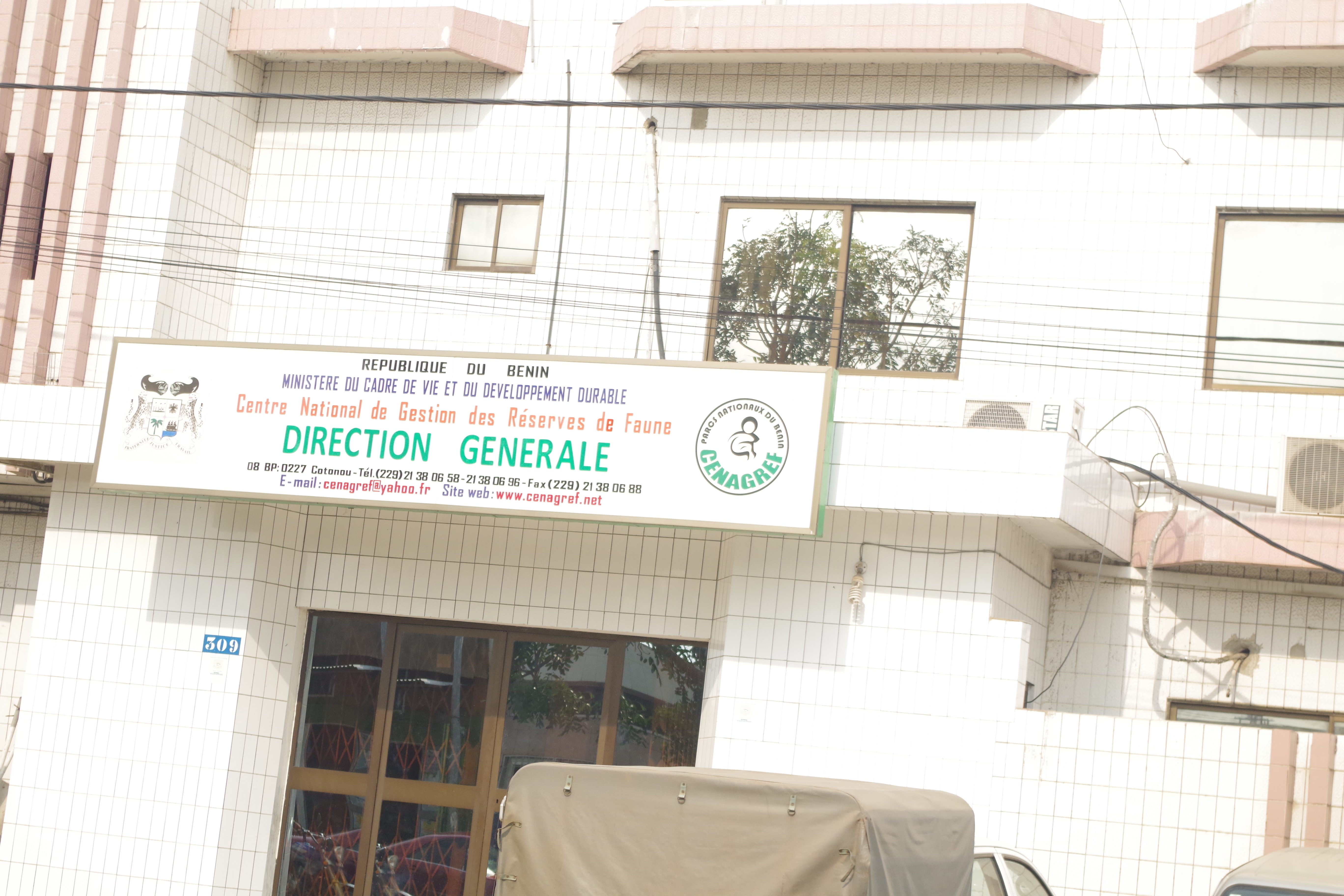 Siège du Centre national de gestion des réserves de faune (CENAGREF) vue de proche